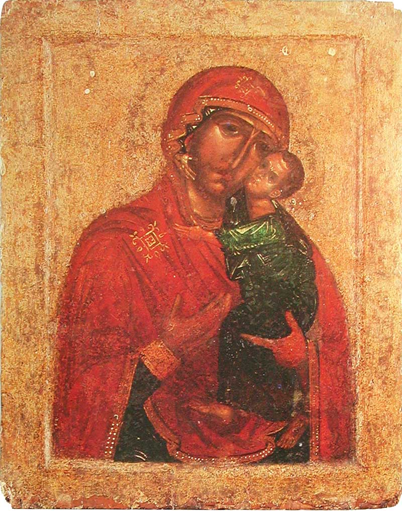 Малая икона Толгской Богоматери (так называемая Толгская II) Ок. 1314 г. 61 × 48 см Ярославский художественный музей, Ярославль, Россия Инв. И-1206 Из Толгского монастыря под Ярославлем.